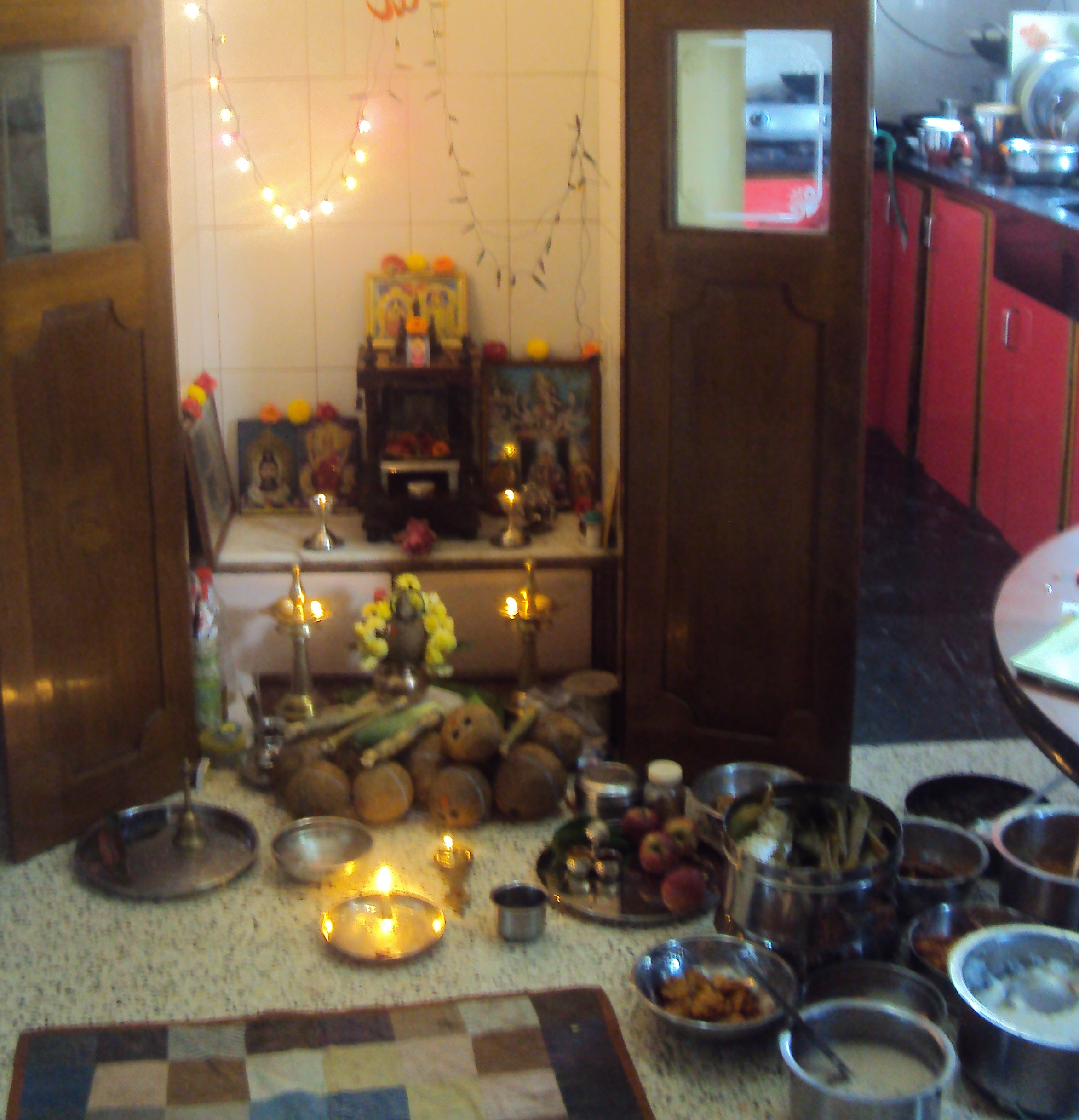 गौरी पूजा के नैवेद्य और वाय्ण